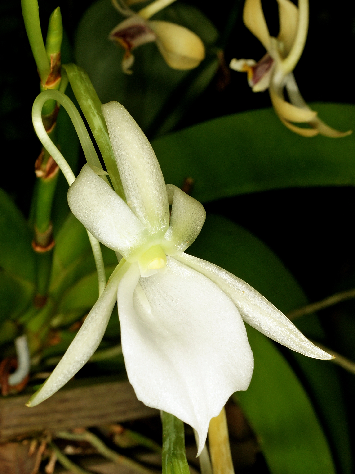 Angraecum leonis